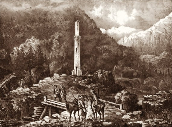 Вид минарета близ Владикавказа.